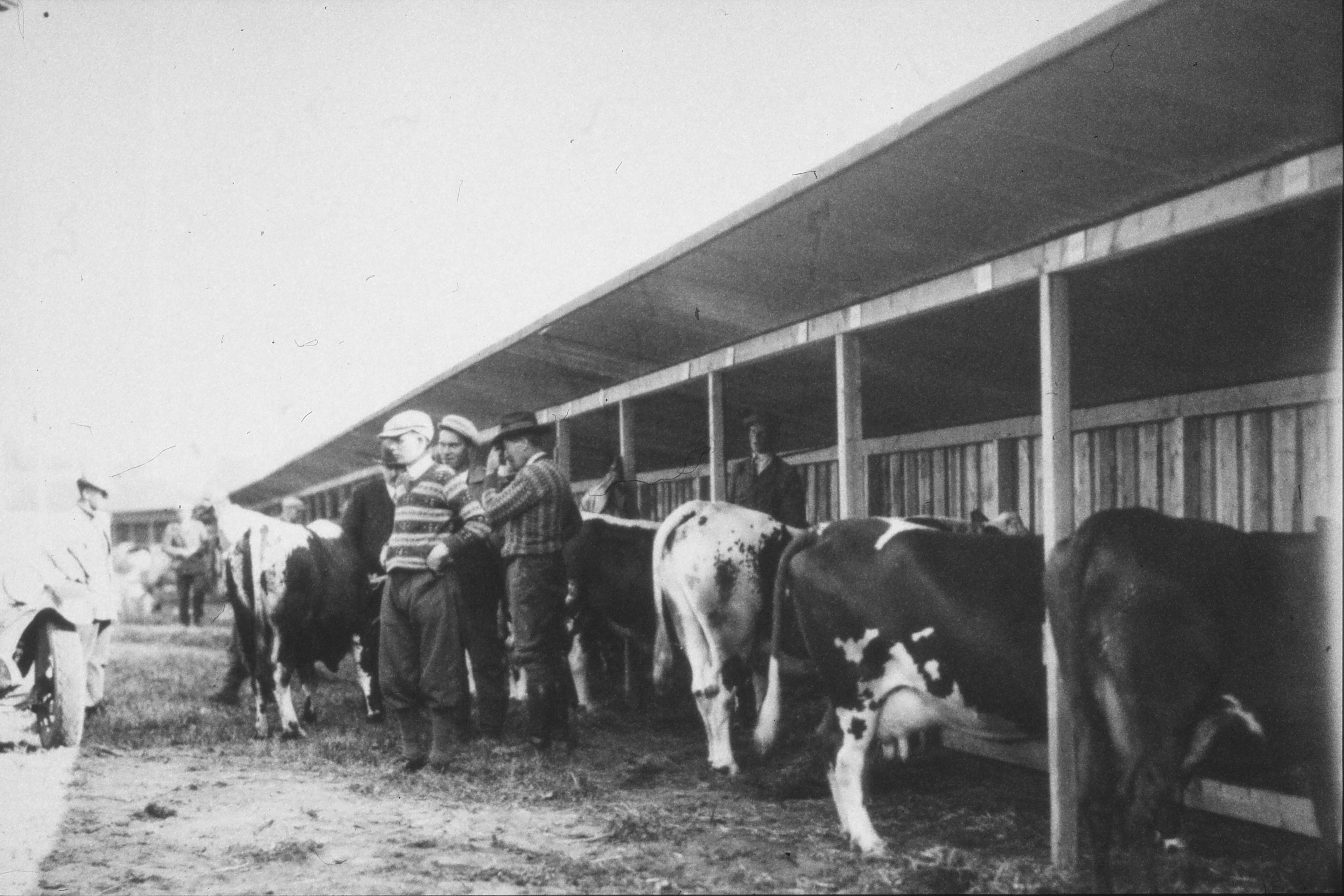 Fra Byantikvarens lysbildesamling.